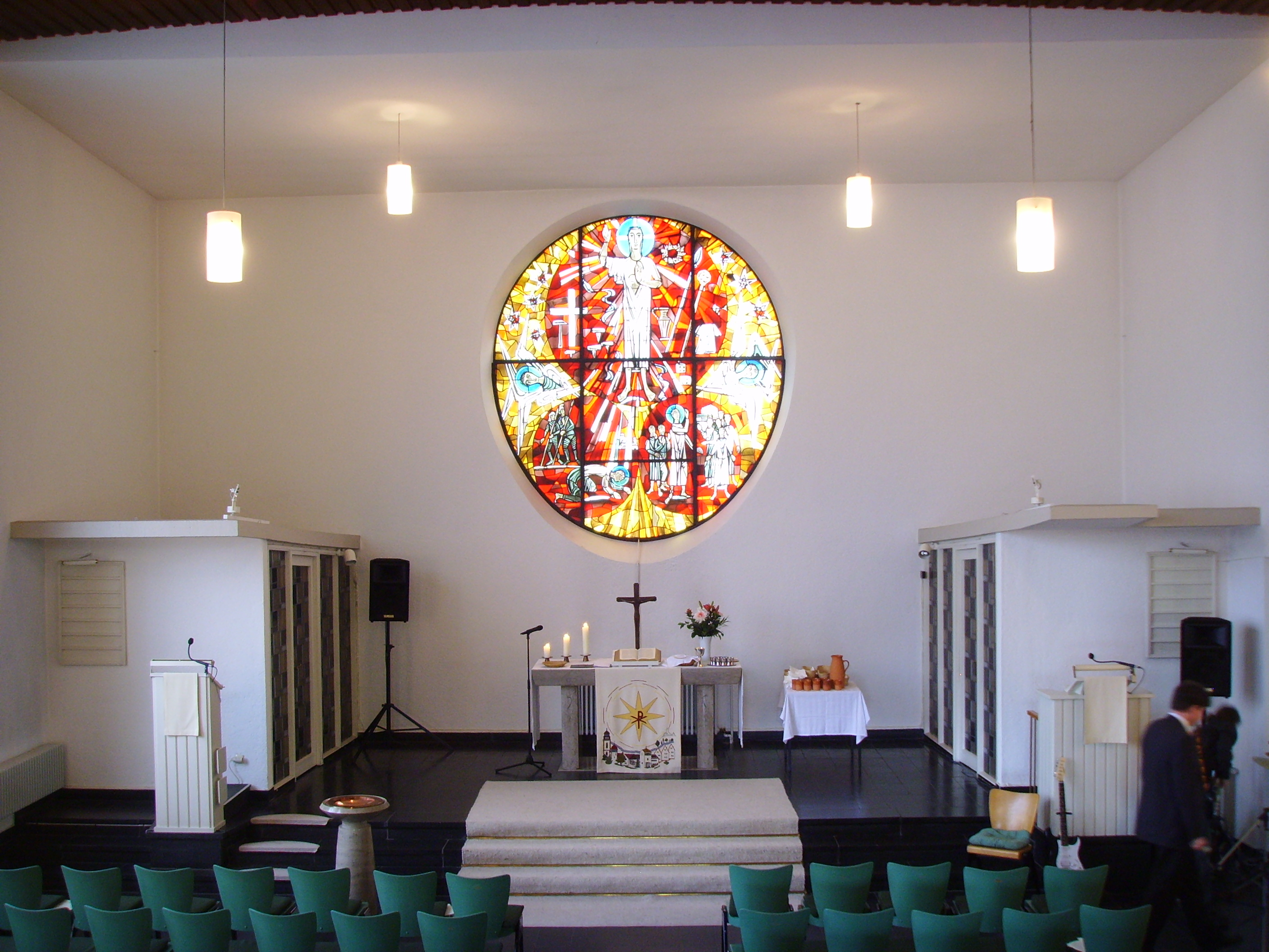 Gießen, evangelische Pauluskirche, innen, Blick von der Empore zum Chor